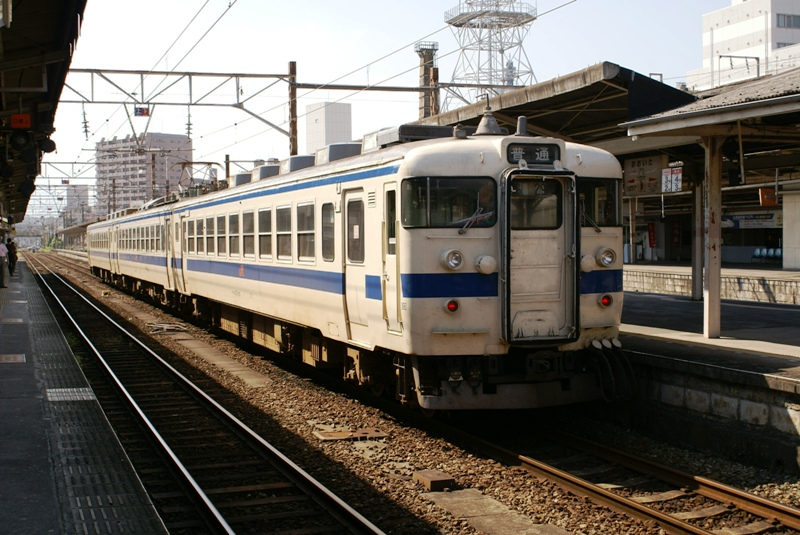 大分駅にて撮影